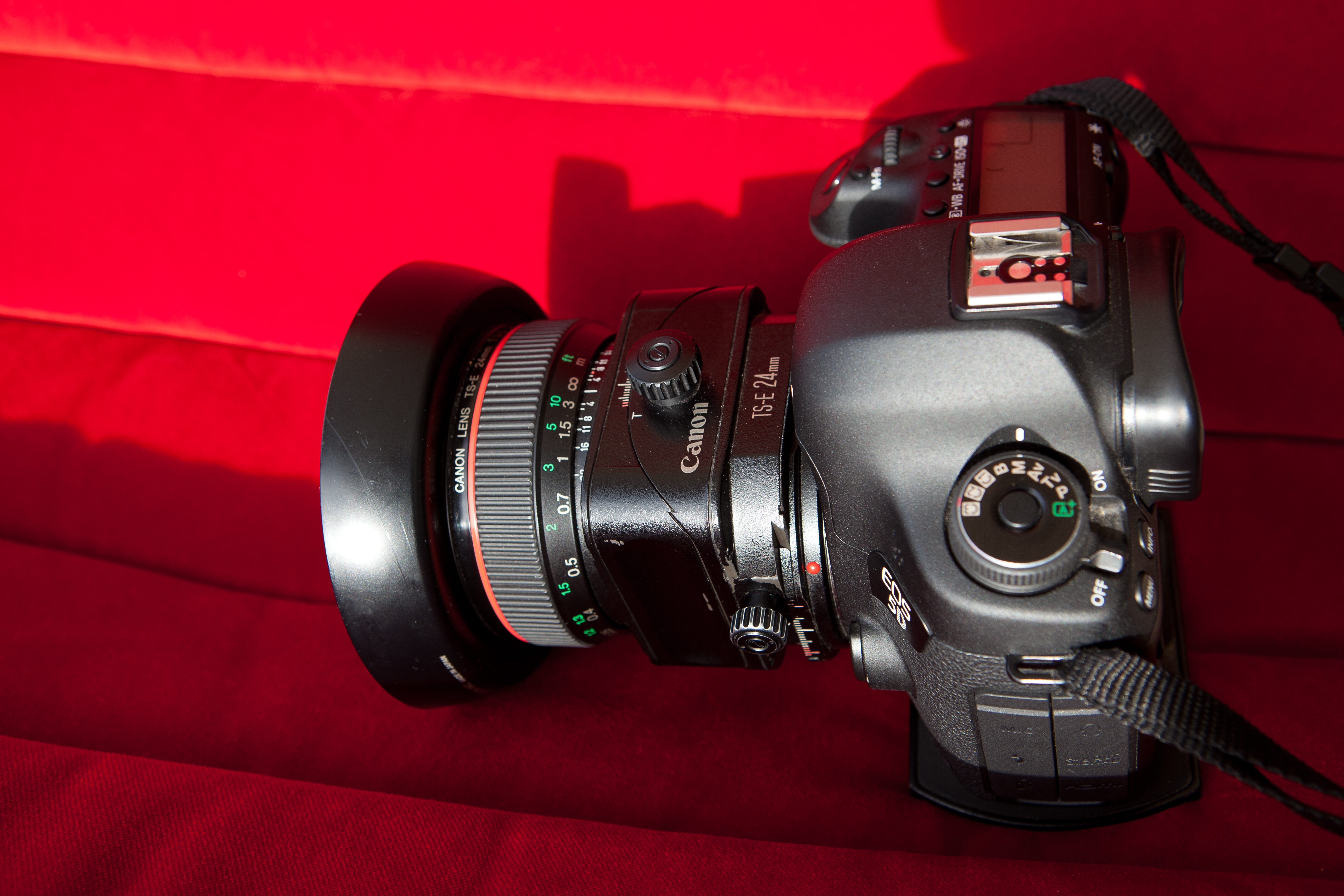 Shift objektiv Canon TSE 24 na fotoaparátu Canon EOS 5D Mark III